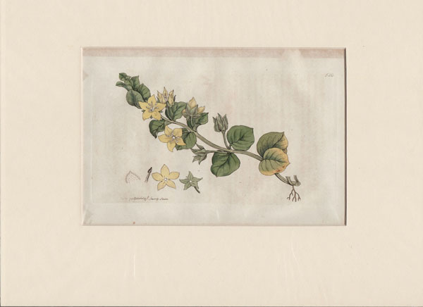 Lysimachia nummularia. Grabado coloreado proveniente de la Enciclopedia Botánica English Botany a Catalogue of Indigenous British Plants